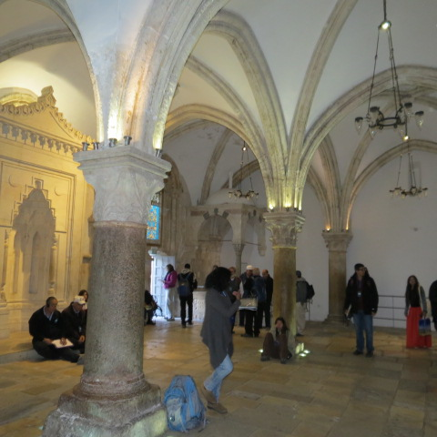 The Cenacle, also known as the "Upper Room", Last Supper Room - Mount Zion, Jerusalem, Israel Coenaculum, Cenaculum חדר הסעודה האחרונה